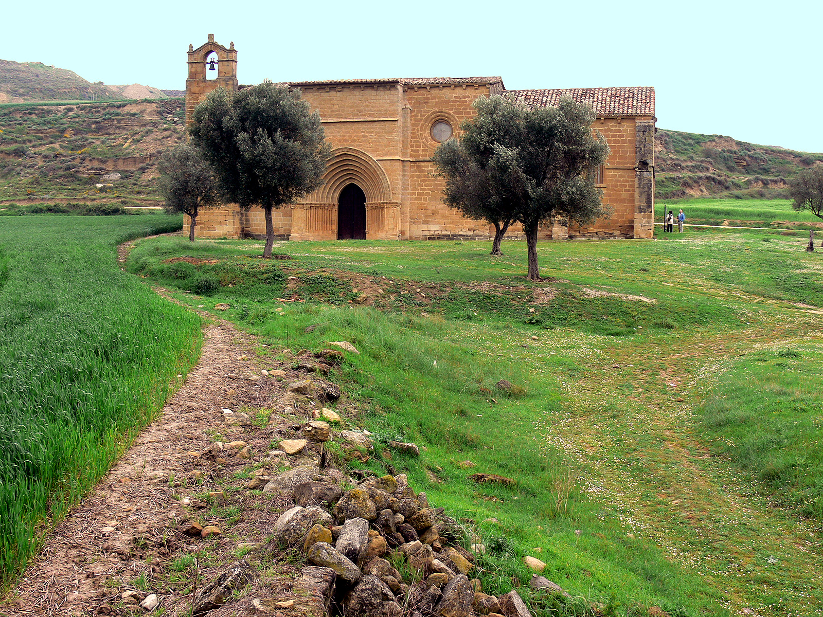 Ermita de Nuestra Señora de Sorejana en Cuzcurrita, La Rioja - España.